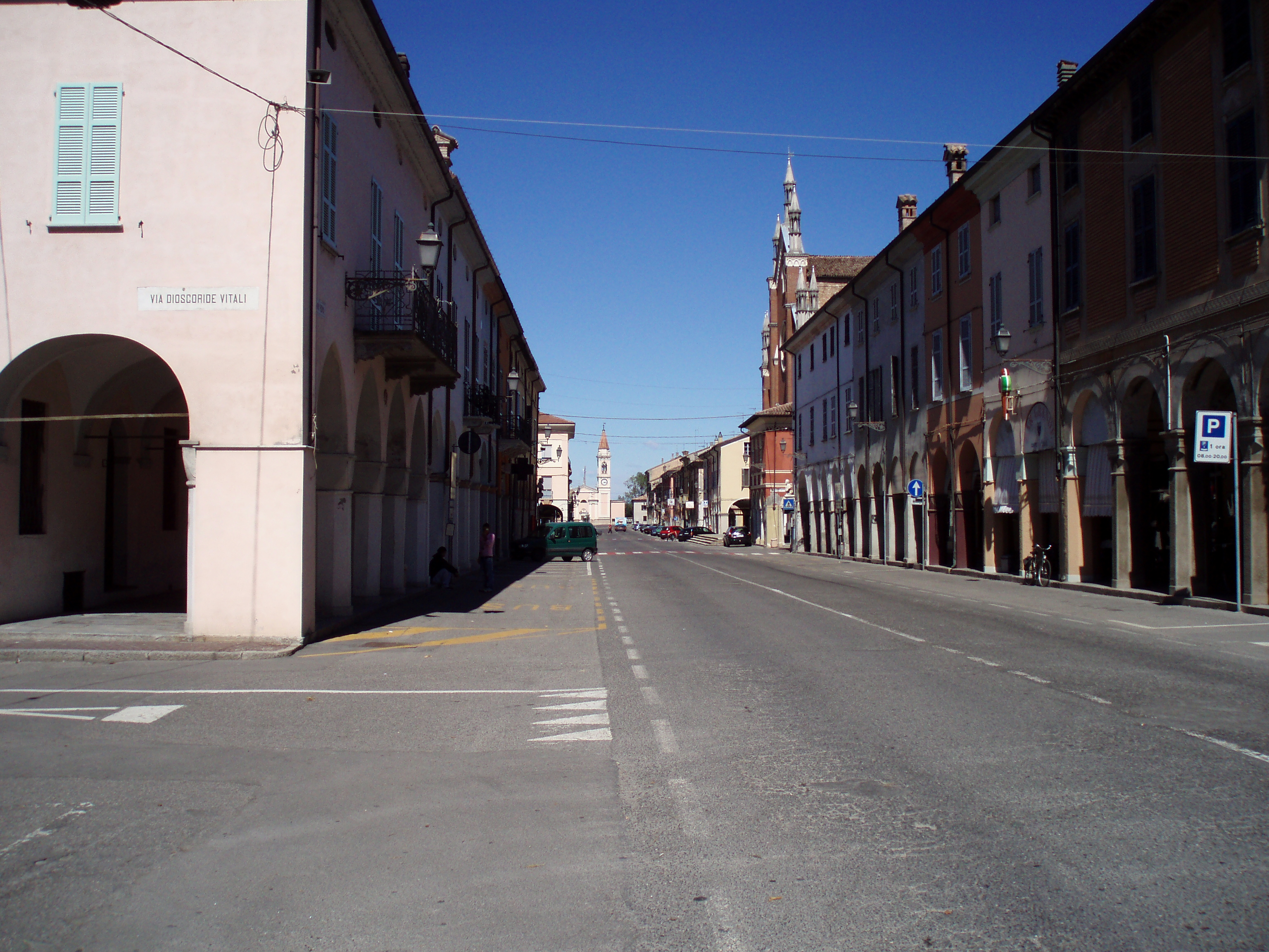 Vista della via centarle di Coretmaggiore da LArgo Umberto I°